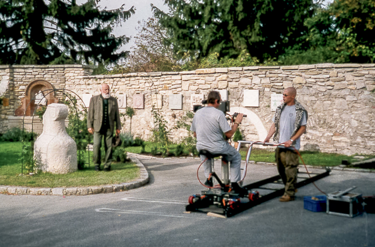 Klingendes Österreich mit Sepp Forcher für ORF 2 beim Europabrunnen in Kaisersteinbruch aufgenommen.